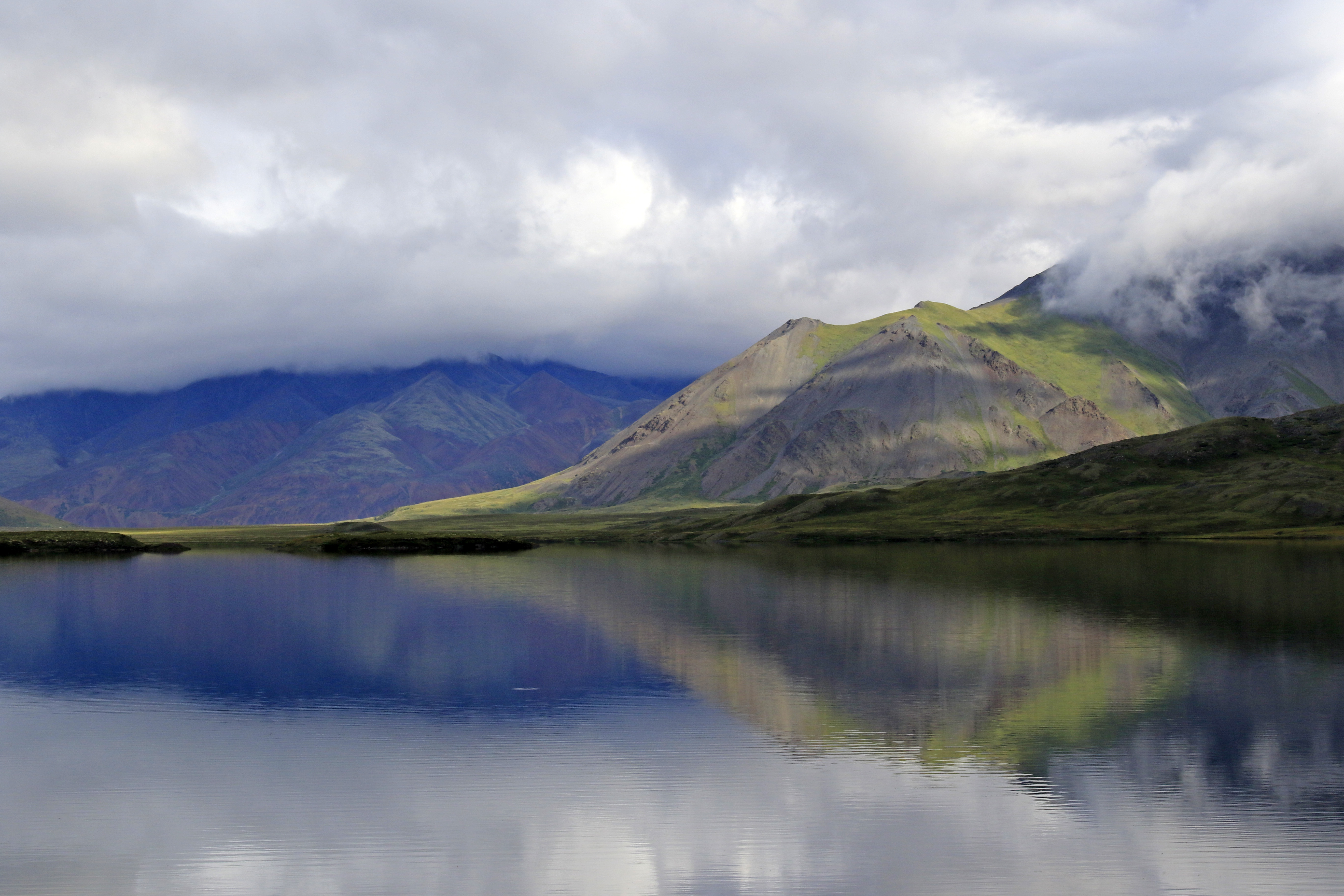 Момский: Расположен в восточной части Момо-Селенняхской впадины и охватывает собой территорию верхней части бассейна реки Момы, включая Буордахский горный массив с пиком г. Победа (3 003 м), Момский район, Якутия (Саха) This image is related to the protected area of Russia number 1410127